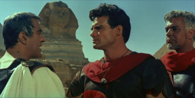 Scena del film